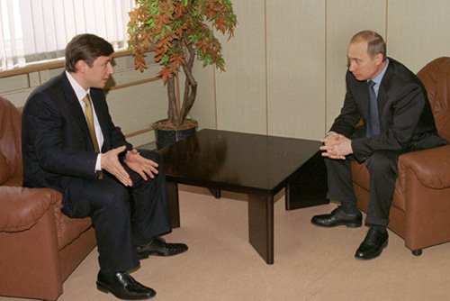 ТАЙМЫРСКИЙ (ДОЛГАНО-НЕНЕЦКИЙ) АВТОНОМНЫЙ ОКРУГ. С губернатором Таймырского автономного округа Александром Хлопониным.